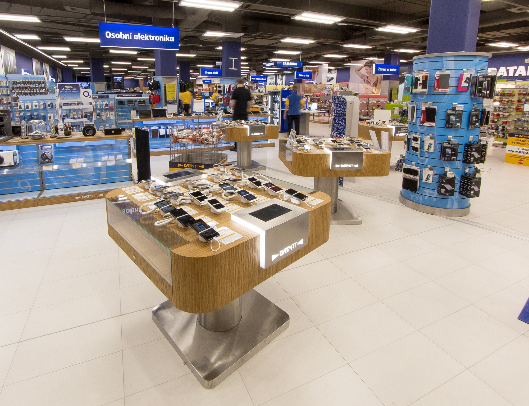 Prodejna DATART na Chodově (Praha)